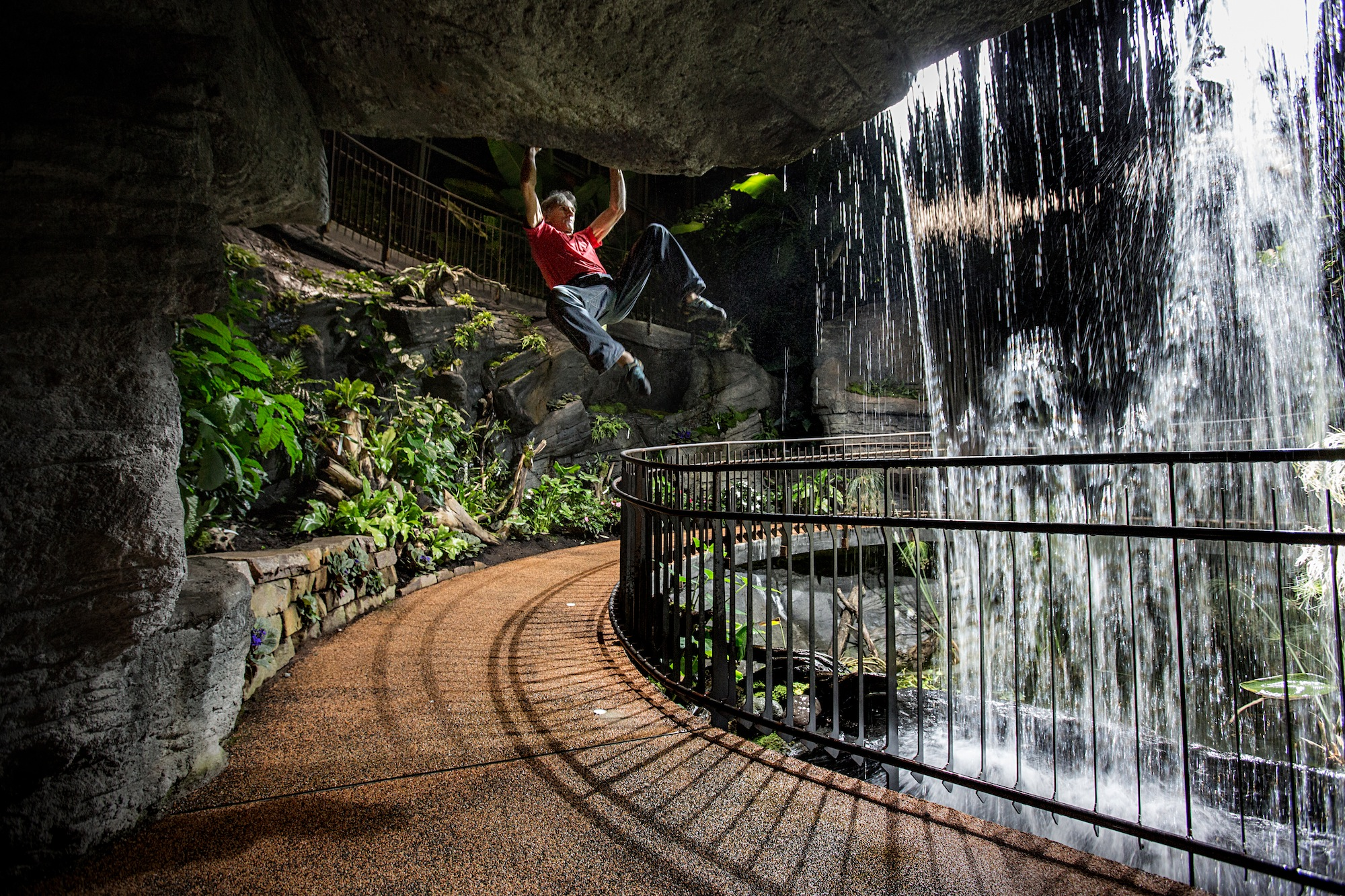 Maurizio Zanolla (Manolo) si arrampica all'interno della serra del MUSE - Museo delle Scienze.